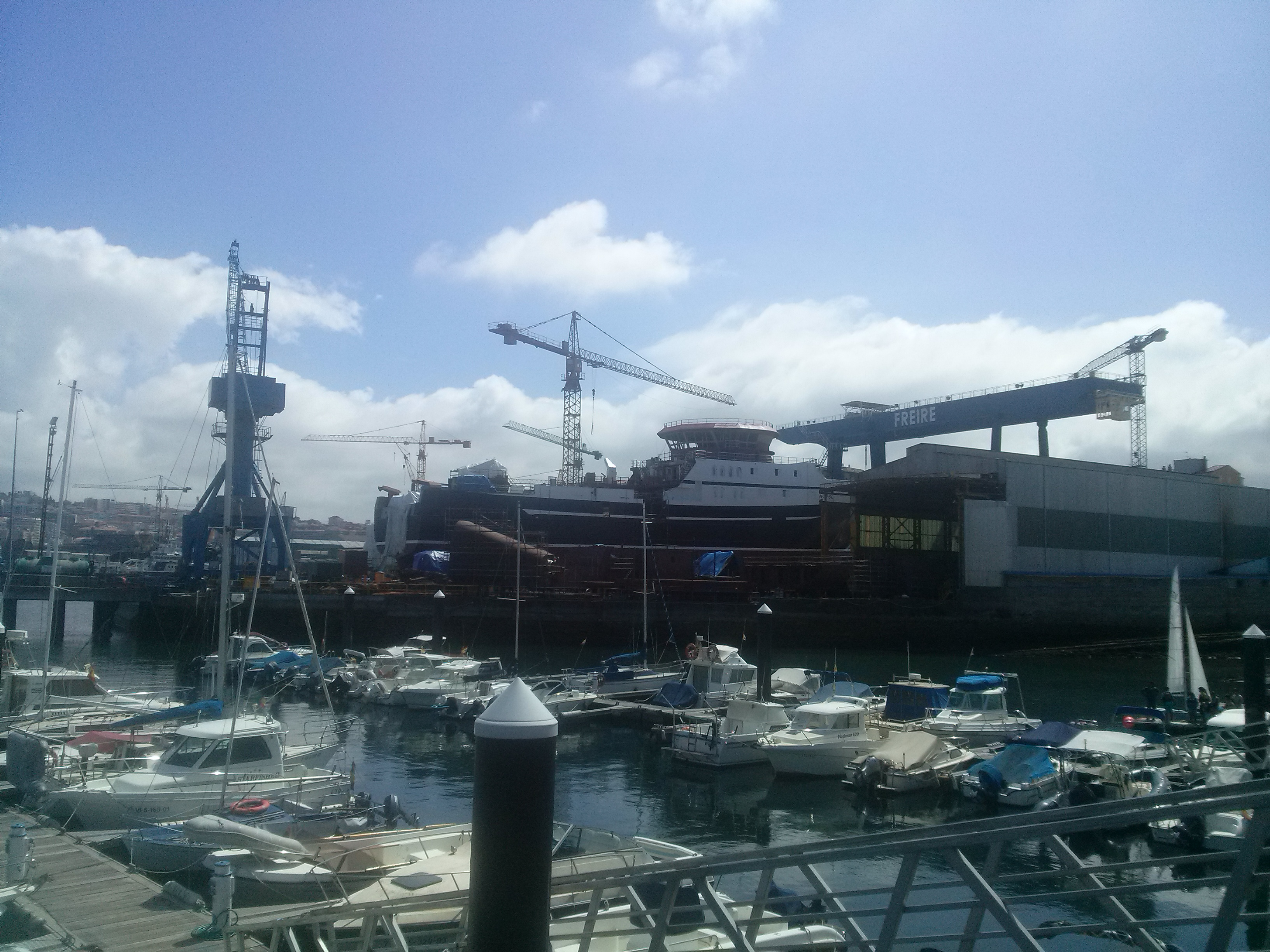 astaleiro freire en 2015